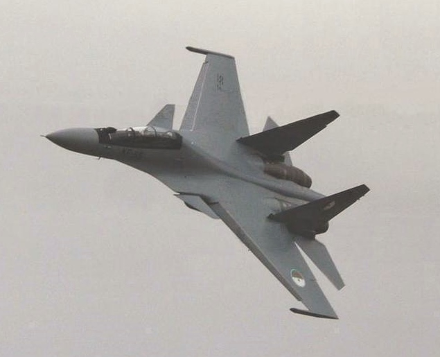 Avion de chasse Su-30MKA au-dessus de la base aérienne de Tamanrasset en Algérie.